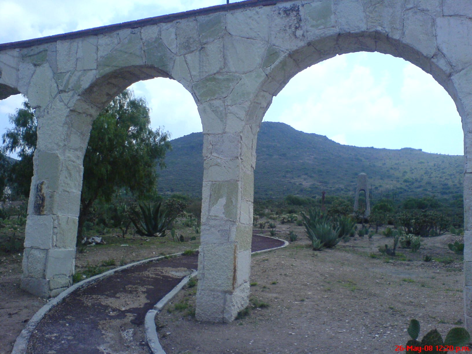 Arcos en Medio del Parque Ecologico de Cubitos en Pachuca